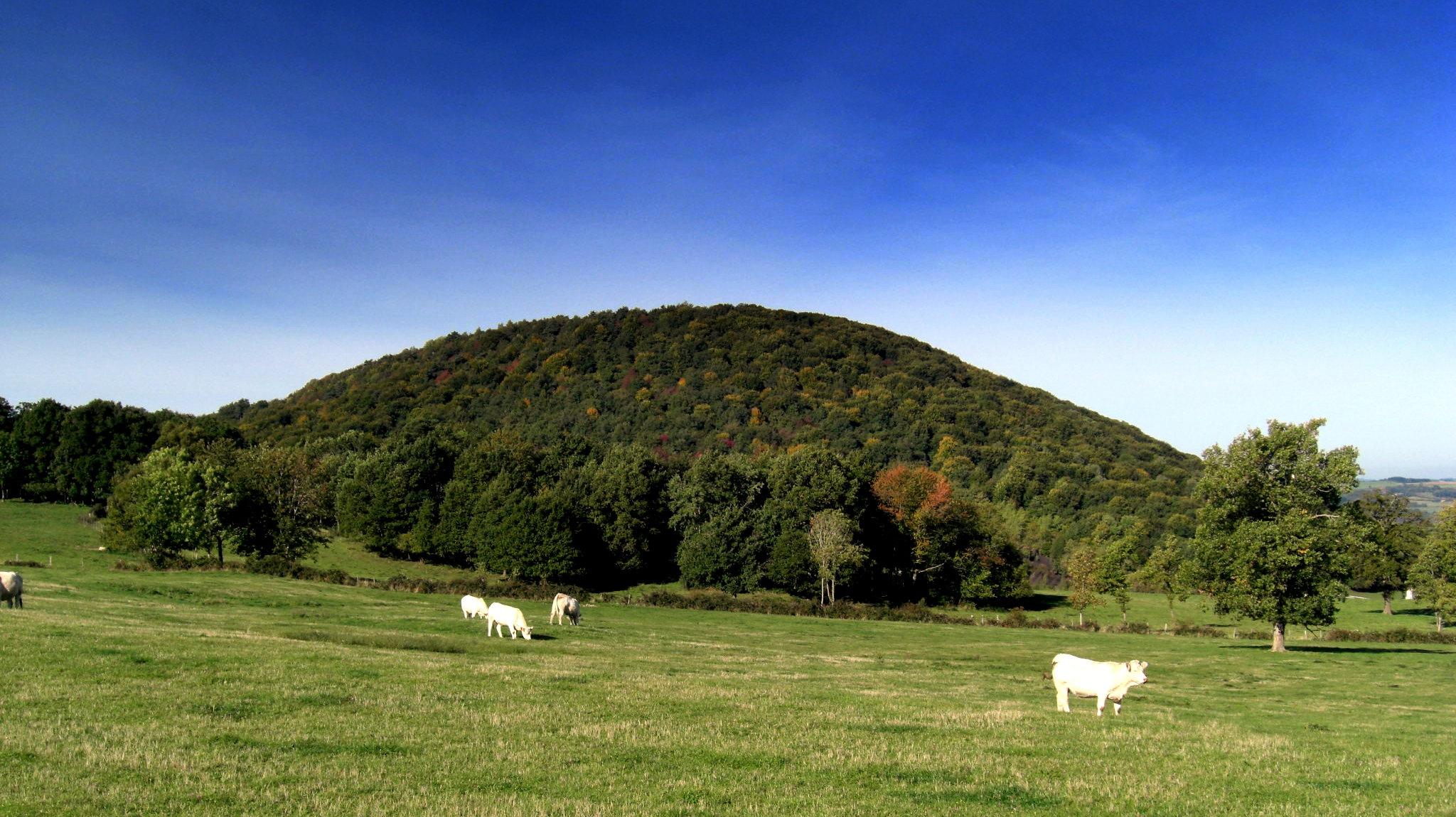 Puy de Chalard, volcan de la chaîne des Puys en Auvergne